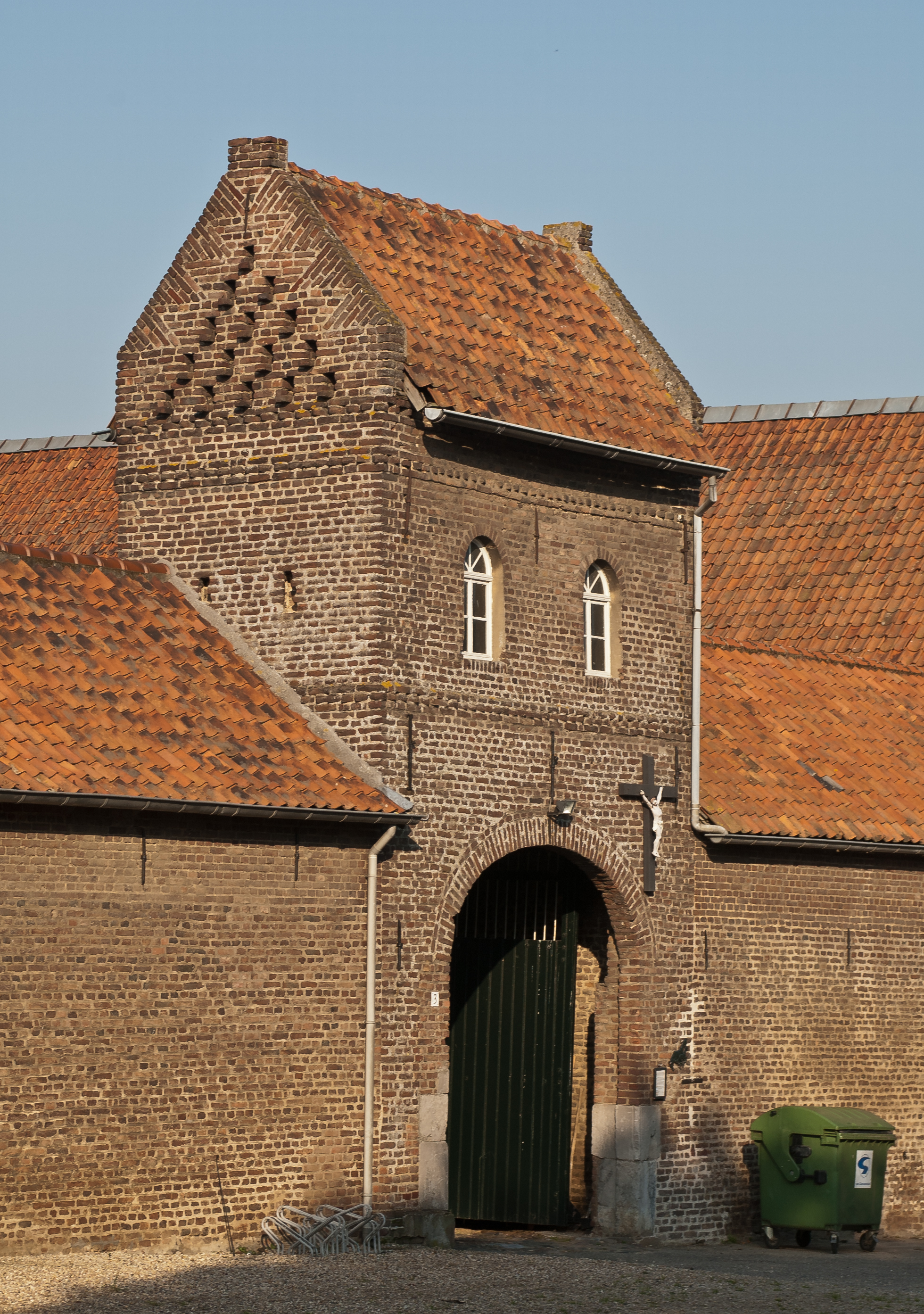 Torhaus des Tonnedenhofes in Melick, Niederlande, mit Taubenschlägen im Giebel.